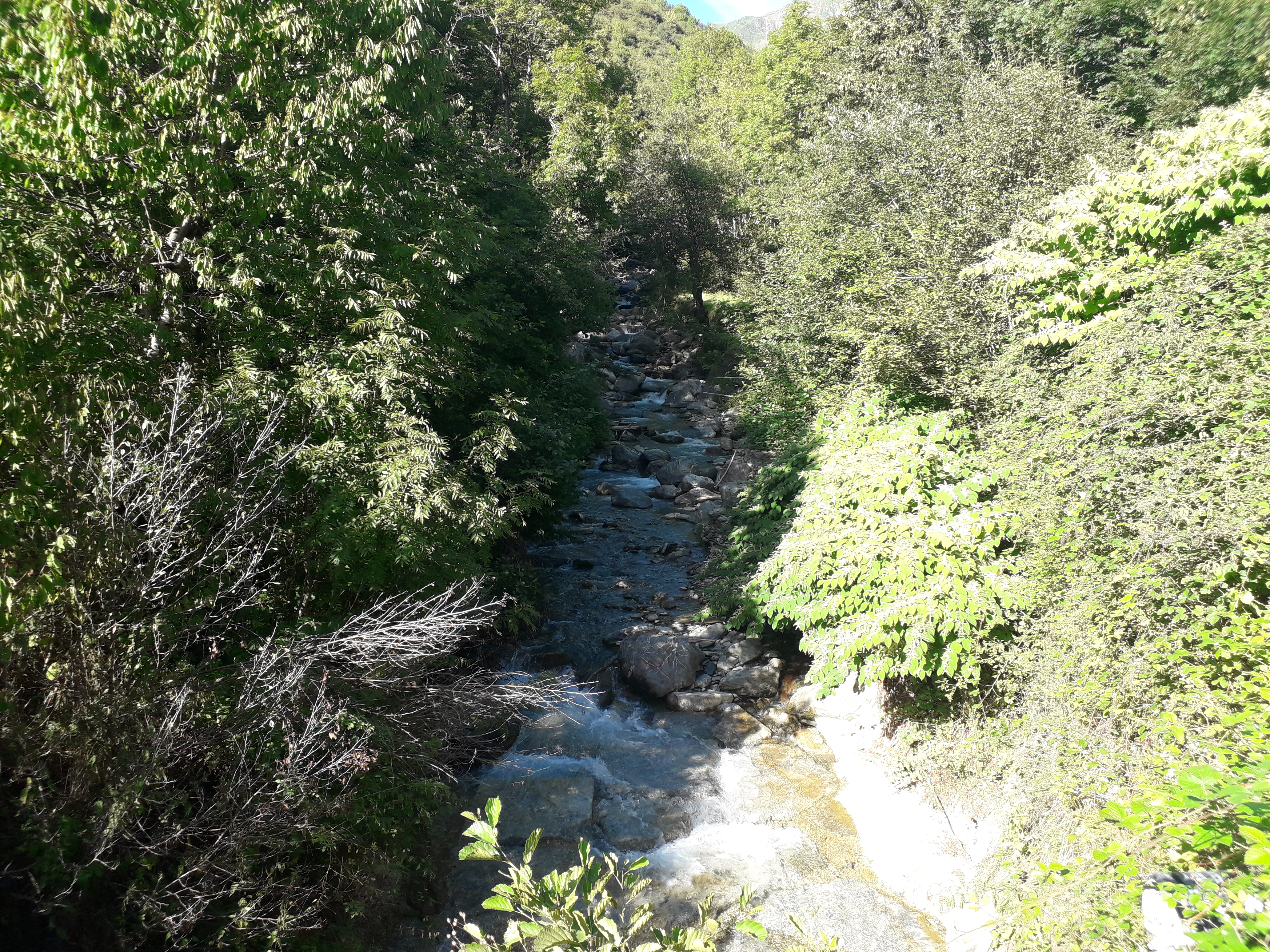 Vista del Río Salient desde el puente del Salient cerca de Vilac